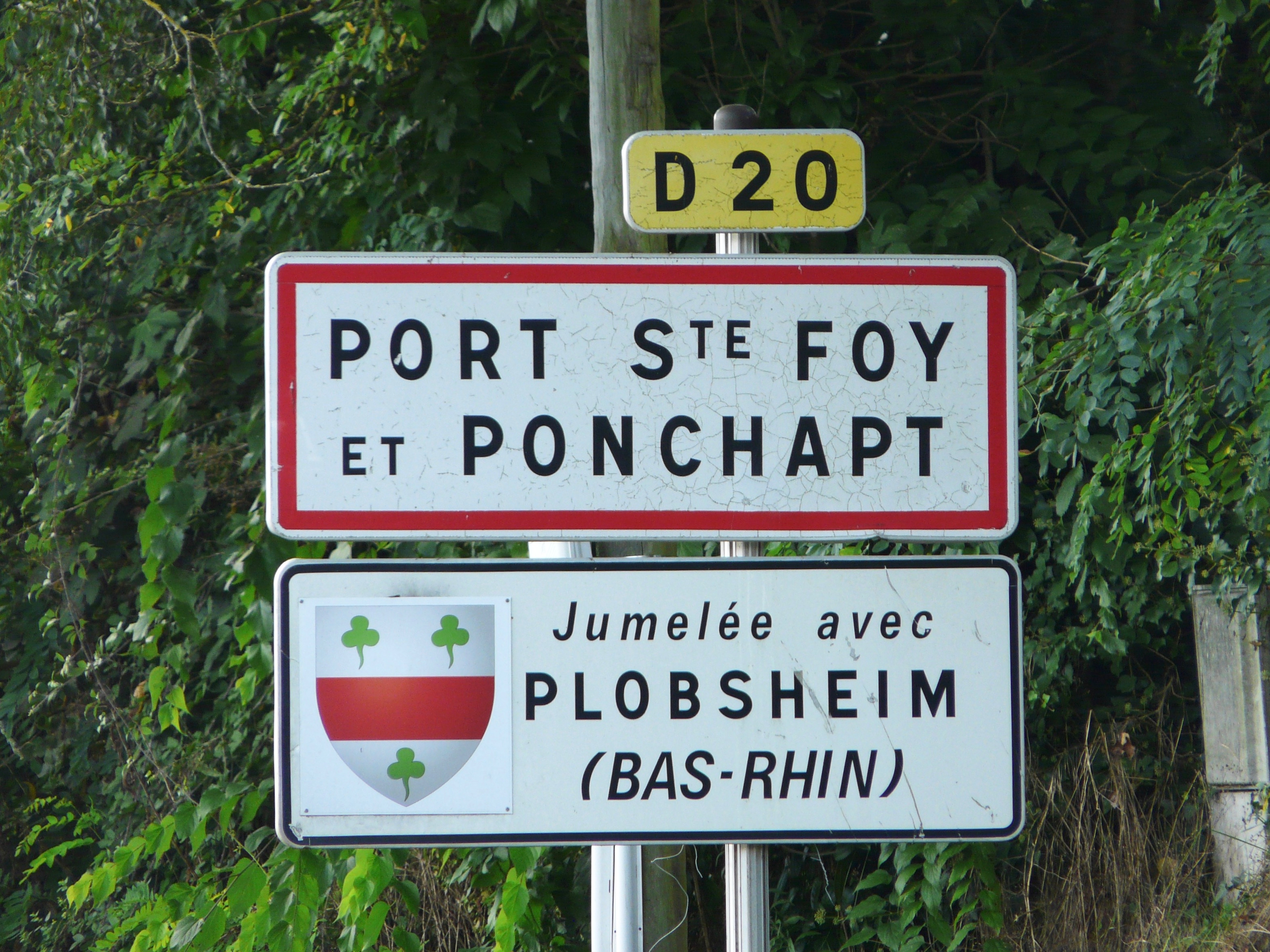 Panneau de jumelage de Port-Sainte-Foy-et-Ponchapt, Dordogne, France.